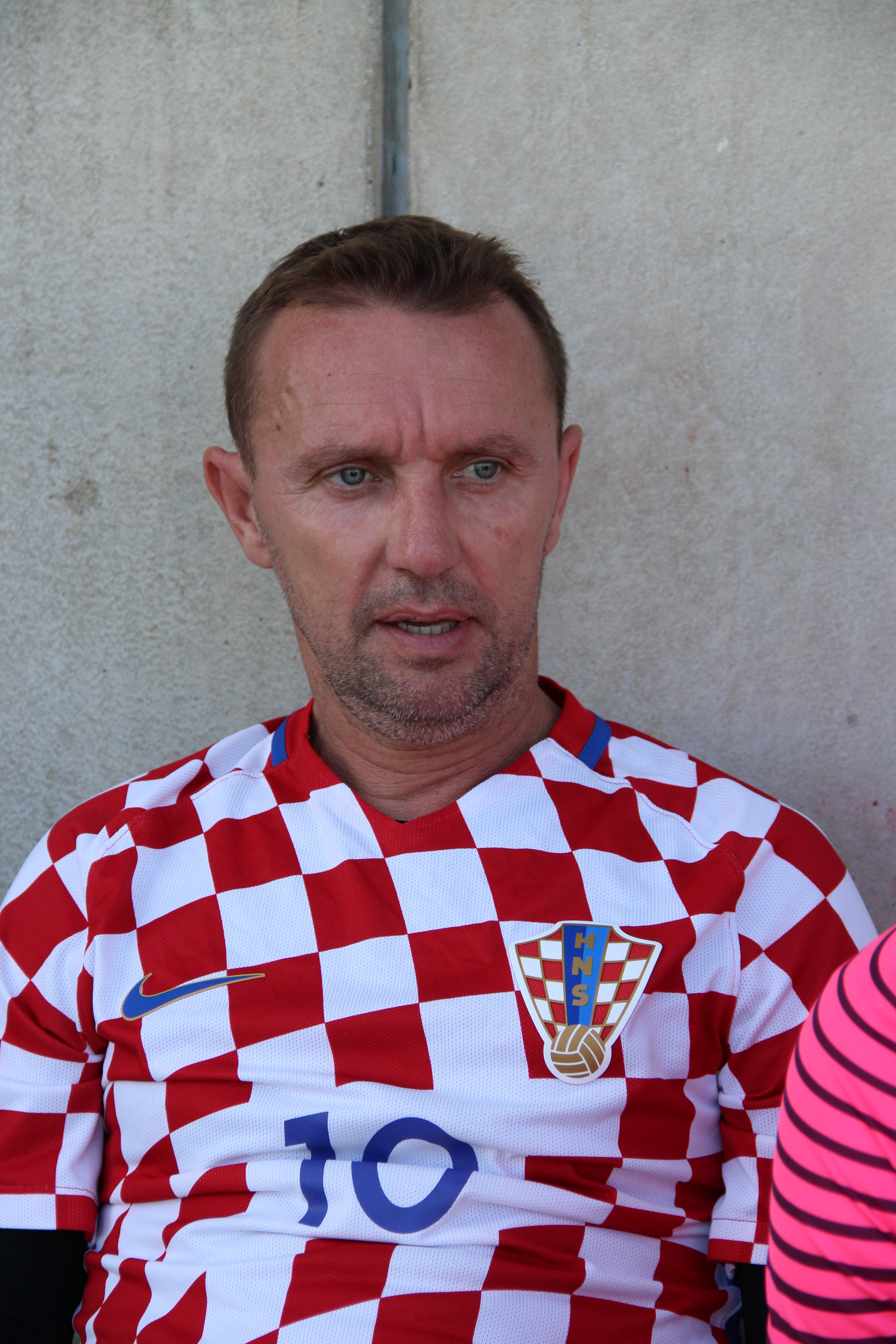 Zeltweger Legendenturnier 2018